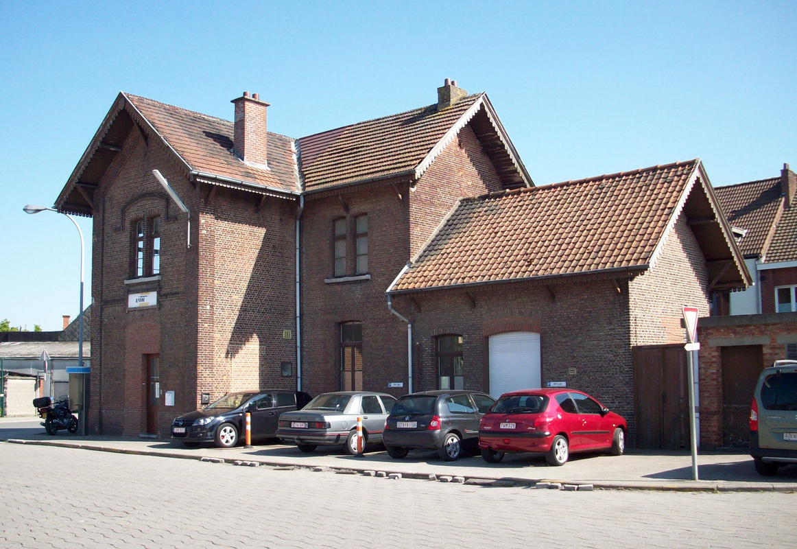 Station Londerzeel. Het oude buurtspoorweggebouw nu in gebruik door De Lijn.